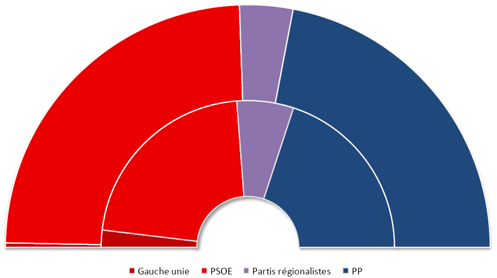 Graphique comparant la proportion de suffrages exprimés (en bas) à la proportions de sièges obtenues par les différentes formations politique au terme des élections législatives espagnoles de 2008.